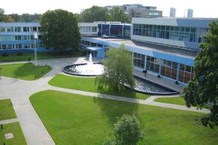 Biznesa augstskola "Turība"